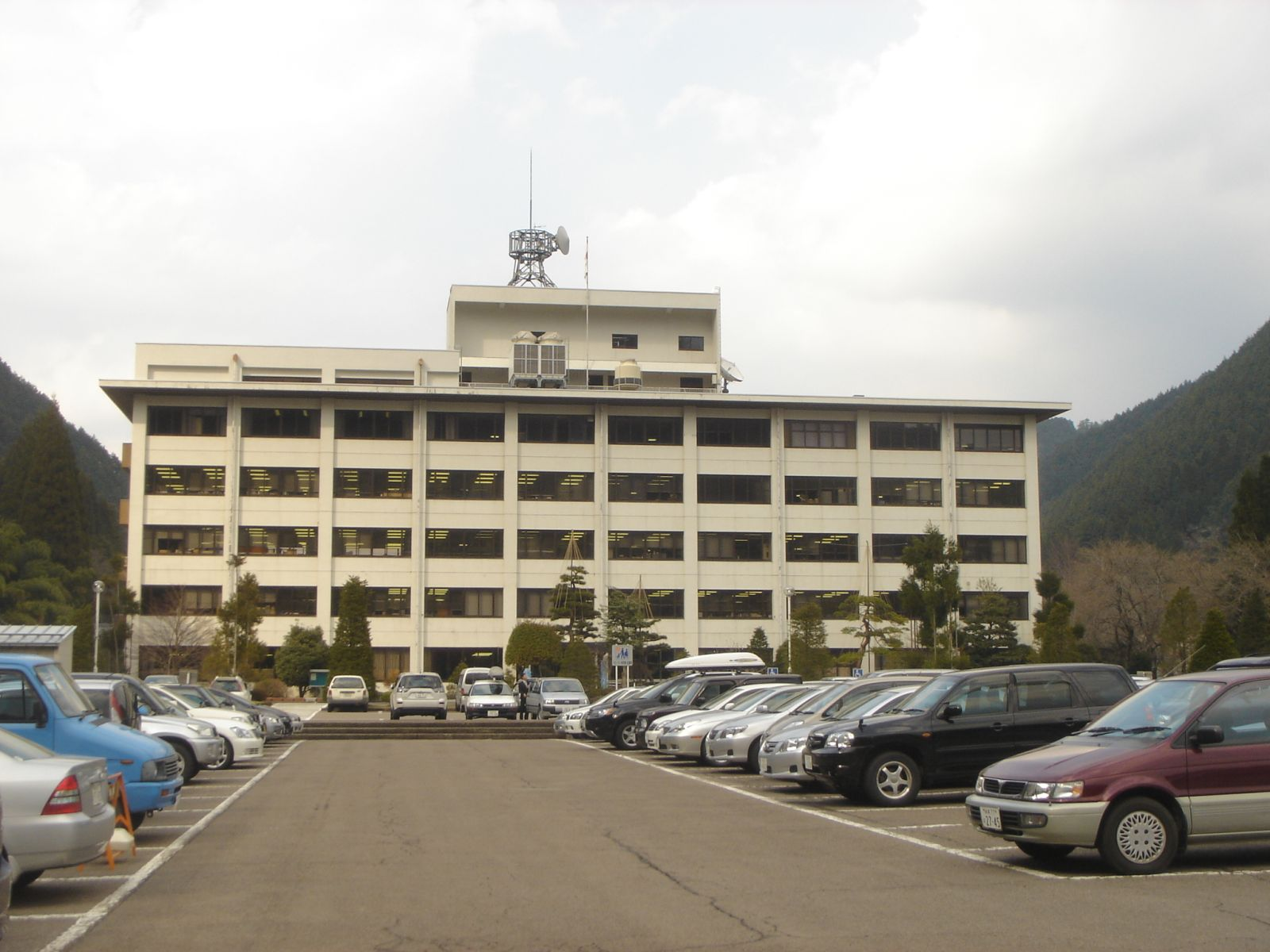 （郡上総合庁舎）,Gujo,Gifu,Japan(岐阜県郡上市)で撮影。